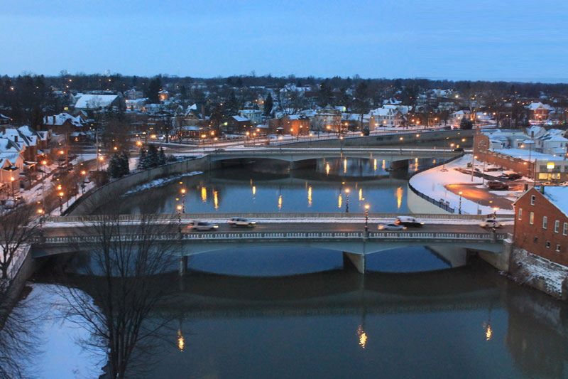 skyle of tiffin